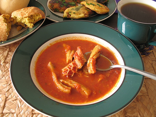 Comida tradicional guatemalteca